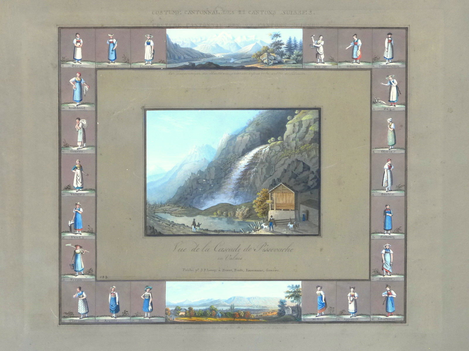 Johann Peter Lamy (Herausgeber): Vue de la Cascade de Pissevache, umrandet mit Ansichten des Montblanc, Genfer Sees und Kostümdarstellungen der 22 Kantone von Gabriel Lory, kolorierte Umrissradierung um 1825.